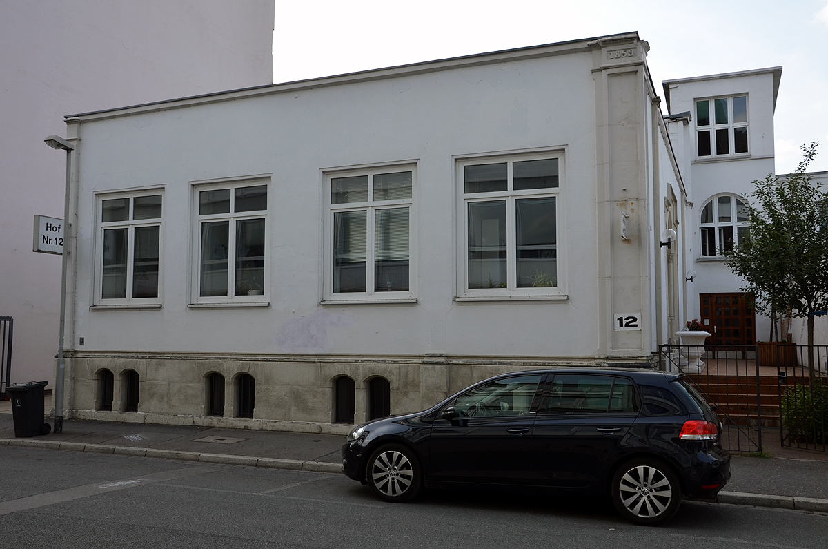 Die in den Fundamenten und bis in das Erdgeschoss teilweise erhaltene, 1862 von dem Architekten und Kunsthistoriker Wilhelm Mithoff als eigenes Wohnhaus erbaute Villa unter der (heutigen) Adresse Stiftstraße 12 in Hannover-Mitte; Blick von der gegenüberliegenden Straßenseite in Richtung Hauseingang ...